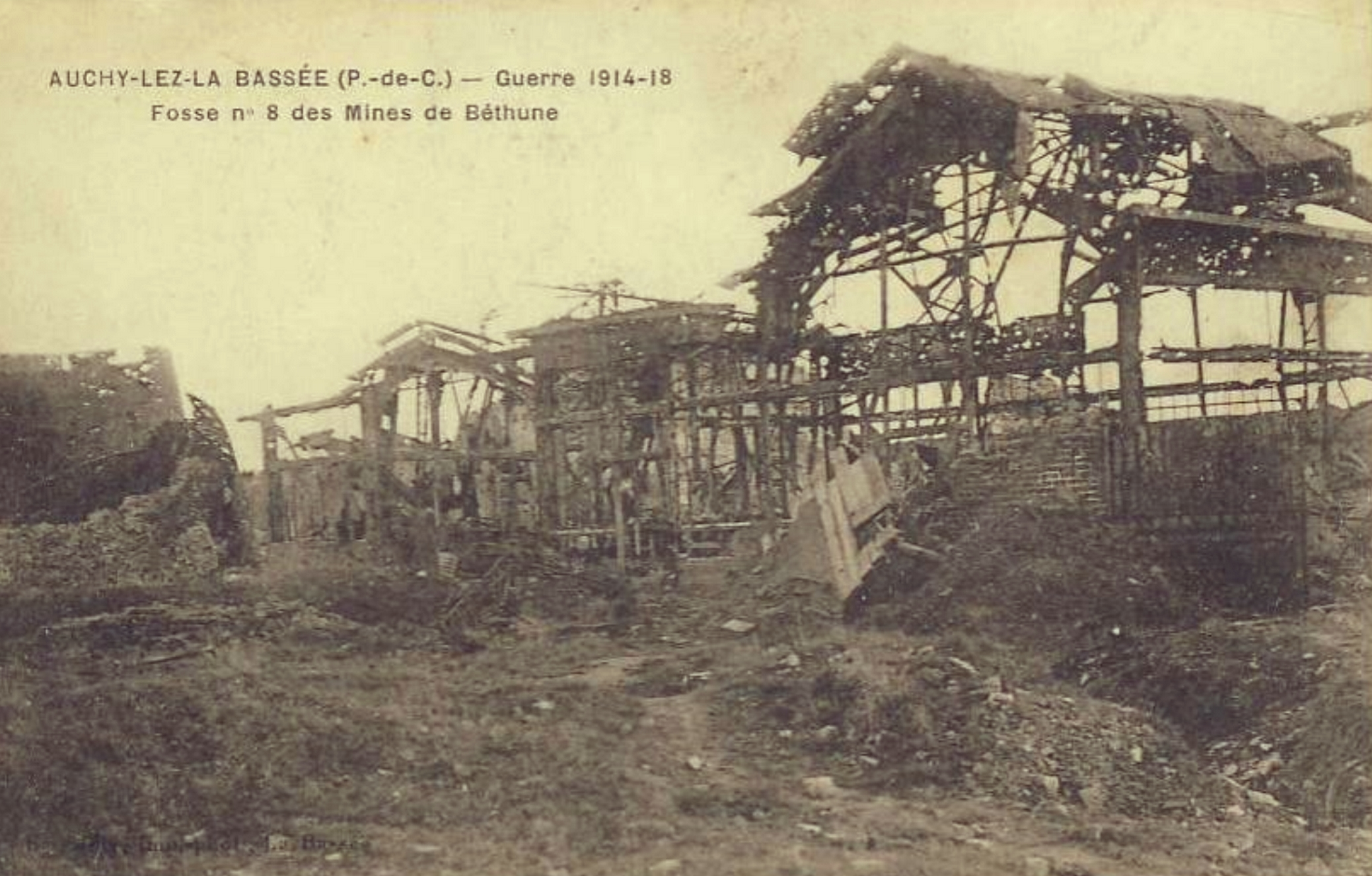 La Fosse n° 8 - 8 bis de la Compagnie des mines de Béthune était un charbonnage constitué de deux puits situé à Auchy-les-Mines, Pas-de-Calais, Nord-Pas-de-Calais, France.